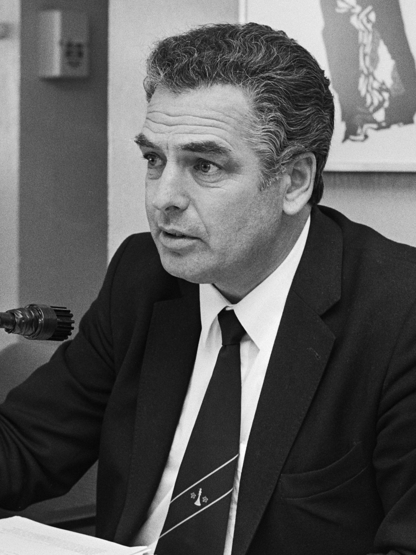 Federatieraad FNV , voorzitter Hans Pont 21 oktober 1985